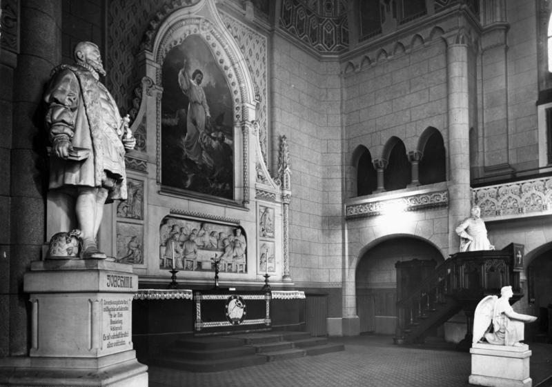 Berlin, Zwinglikirche, Standbilder Berlin 1933 Zwingli-Kirche in der Rudolfstraße (Friedrichshain) U.Bz.: den Altar und die Standbilder der Kurfürsten Joachim II. (links) und Gustav Adolf (rechts) 4433-33 ADN-Text: ADN-ZB/Archiv Berlin 1933 Blick auf den Altar und auf die Standbilder des brandenburgischen Kurfürsten Joachim II. (im Vordergrund) und des schwedischen Königs Gustav II. Adolf in der Zwinglikirche am Rudolfplatz im Stadtbezirk Friedrichshain. 4433-33